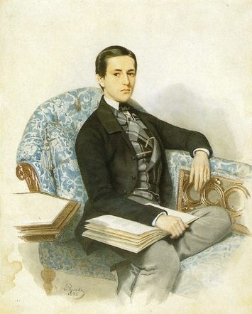 Князь Эммануил Васильевич Голицын (1834-1892)